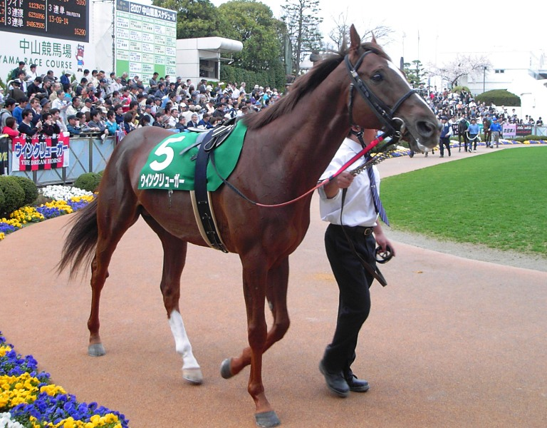 Win Kluger